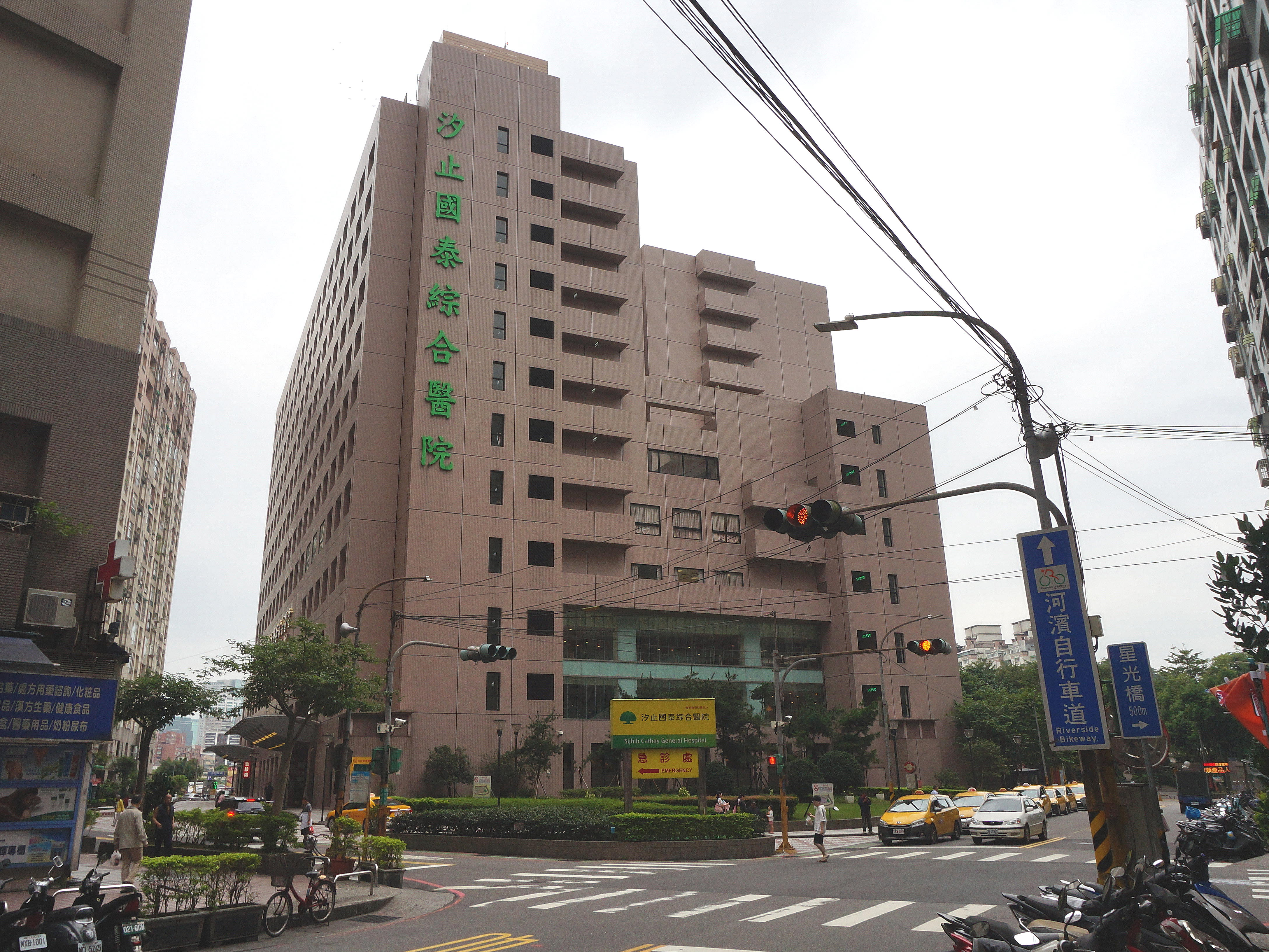 從新北市汐止區建成路仰望汐止國泰綜合醫院。